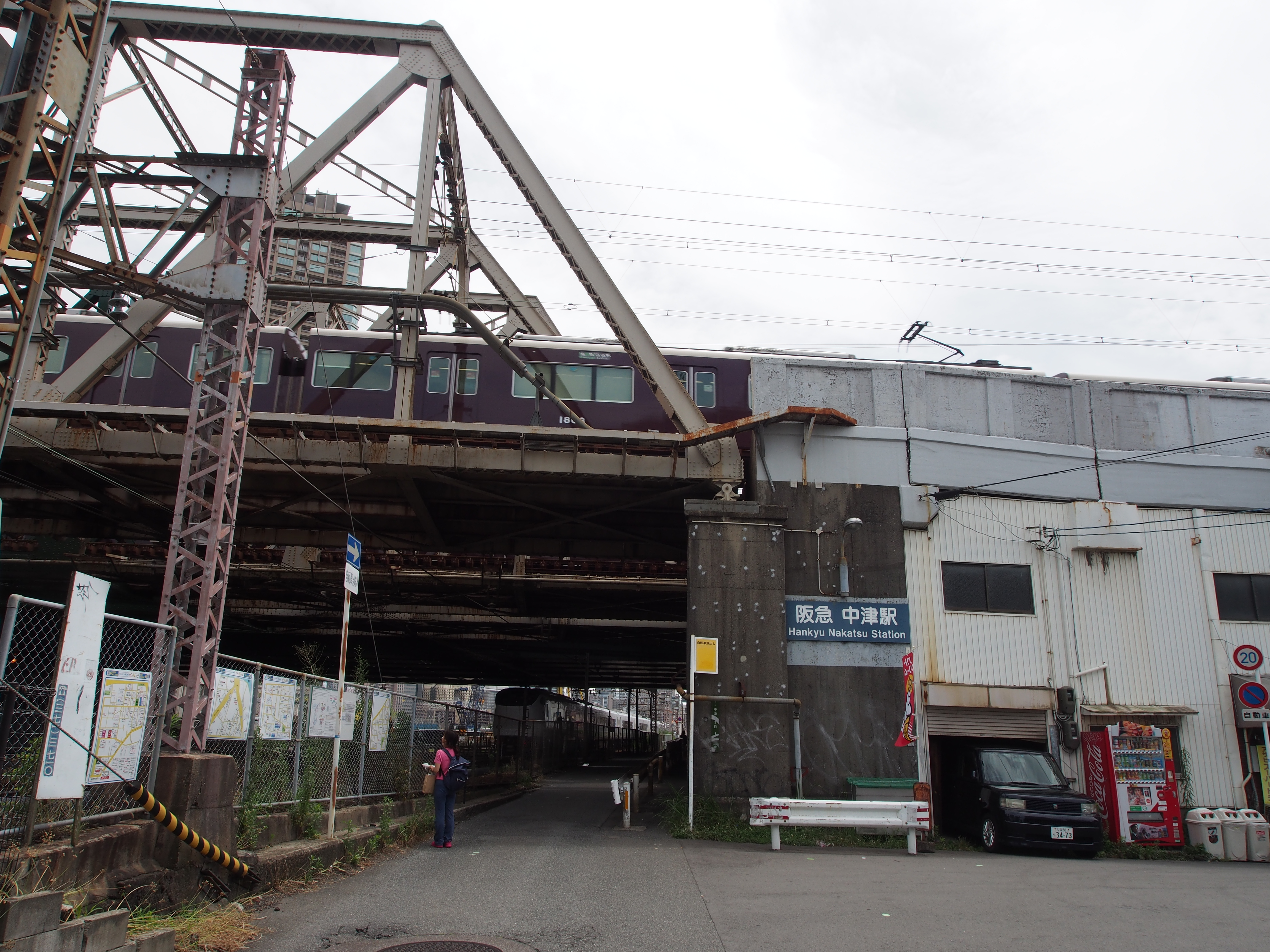 Hankyu Nakatsu station